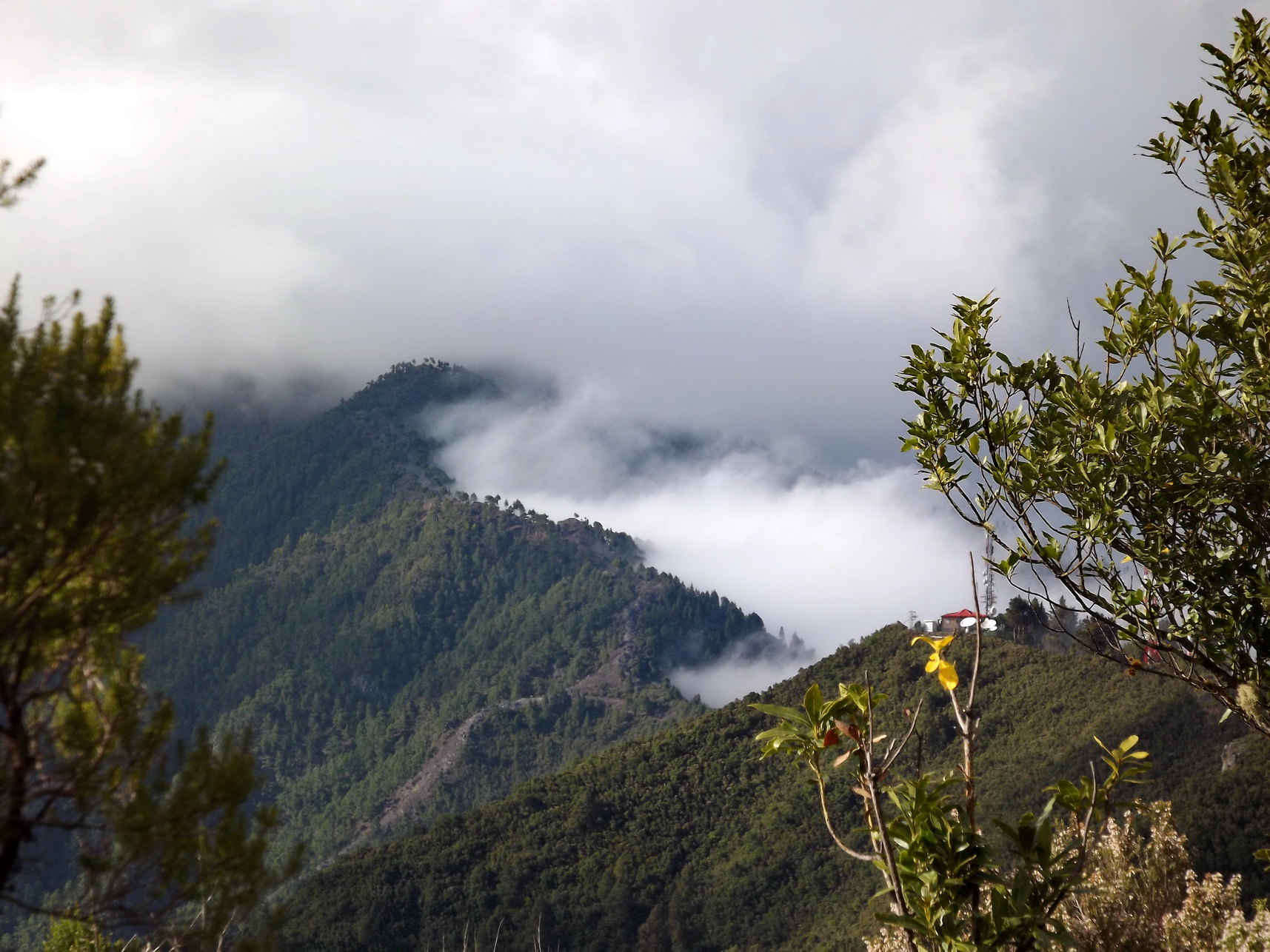 Cumbre Nueva, La Palma, Spain